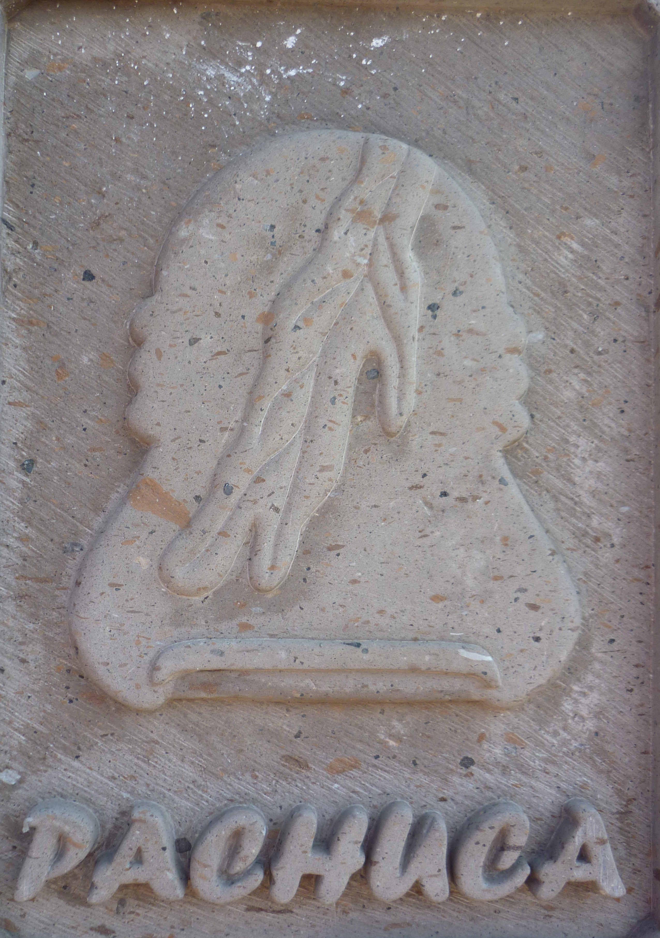 escudo de pachuca de soto en el monumeto frente al seguro social en pachuca de soto